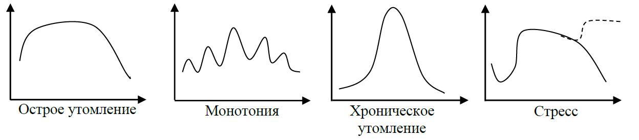 Работоспособность типы